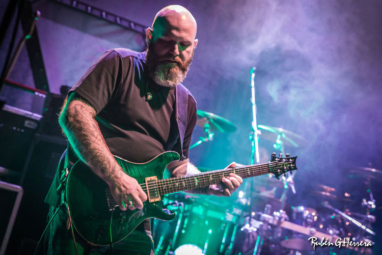 Piotr Grudzinski, guitarist of Riverside band